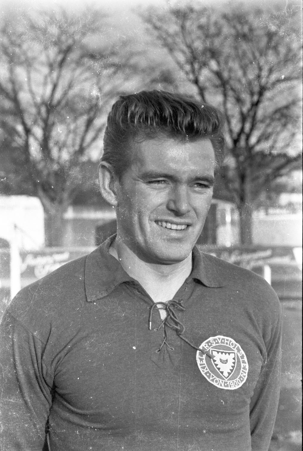 Fußballspieler von Holstein Kiel in der Saison 1964/1965.